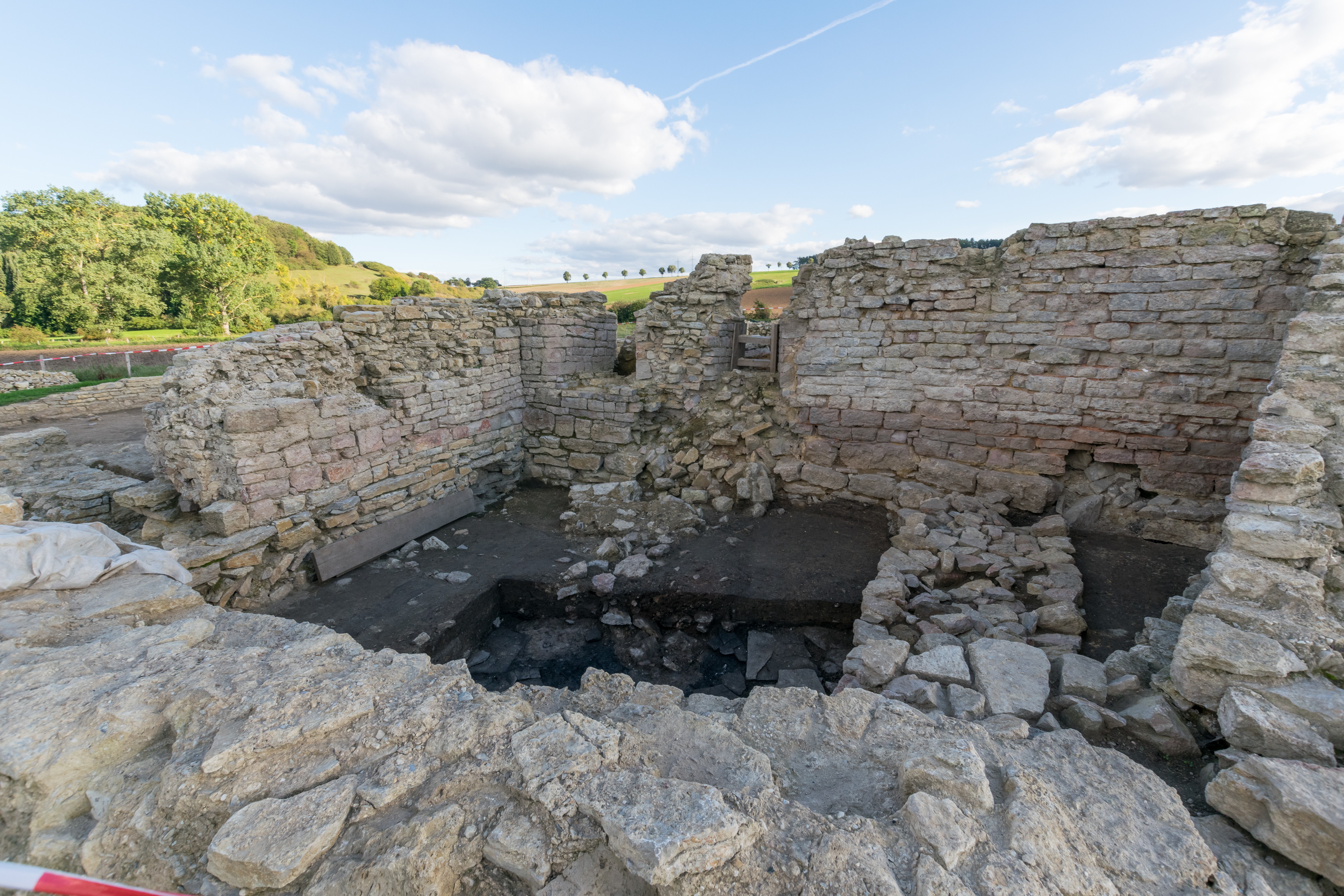 Führung zur Ausgrabung an der Holsterburg am 29.09.2015